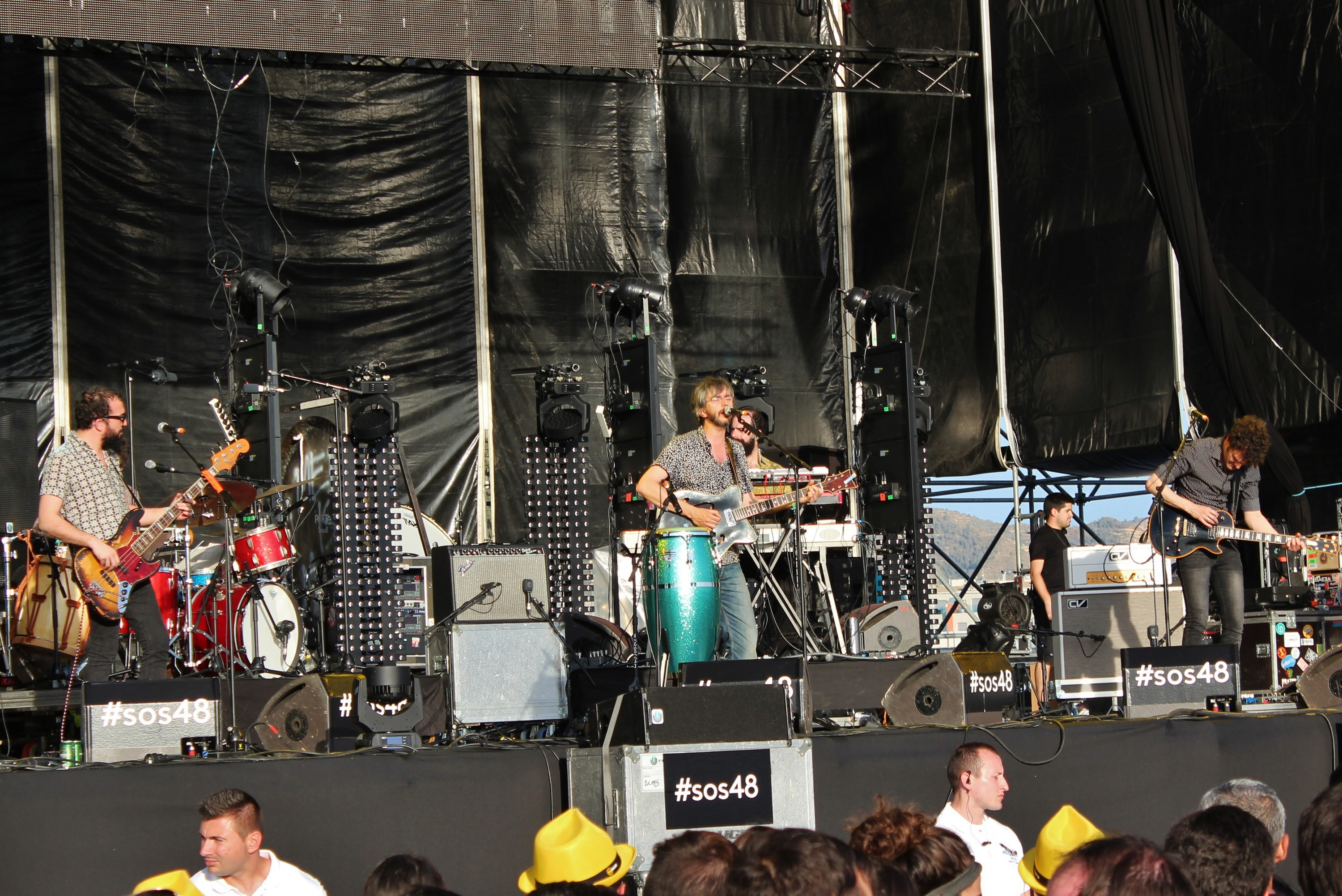 Xoel López es un músico de rock alternativo de A Coruña. Concierto en el Festival SOS 4.8 2015, en Murcia.